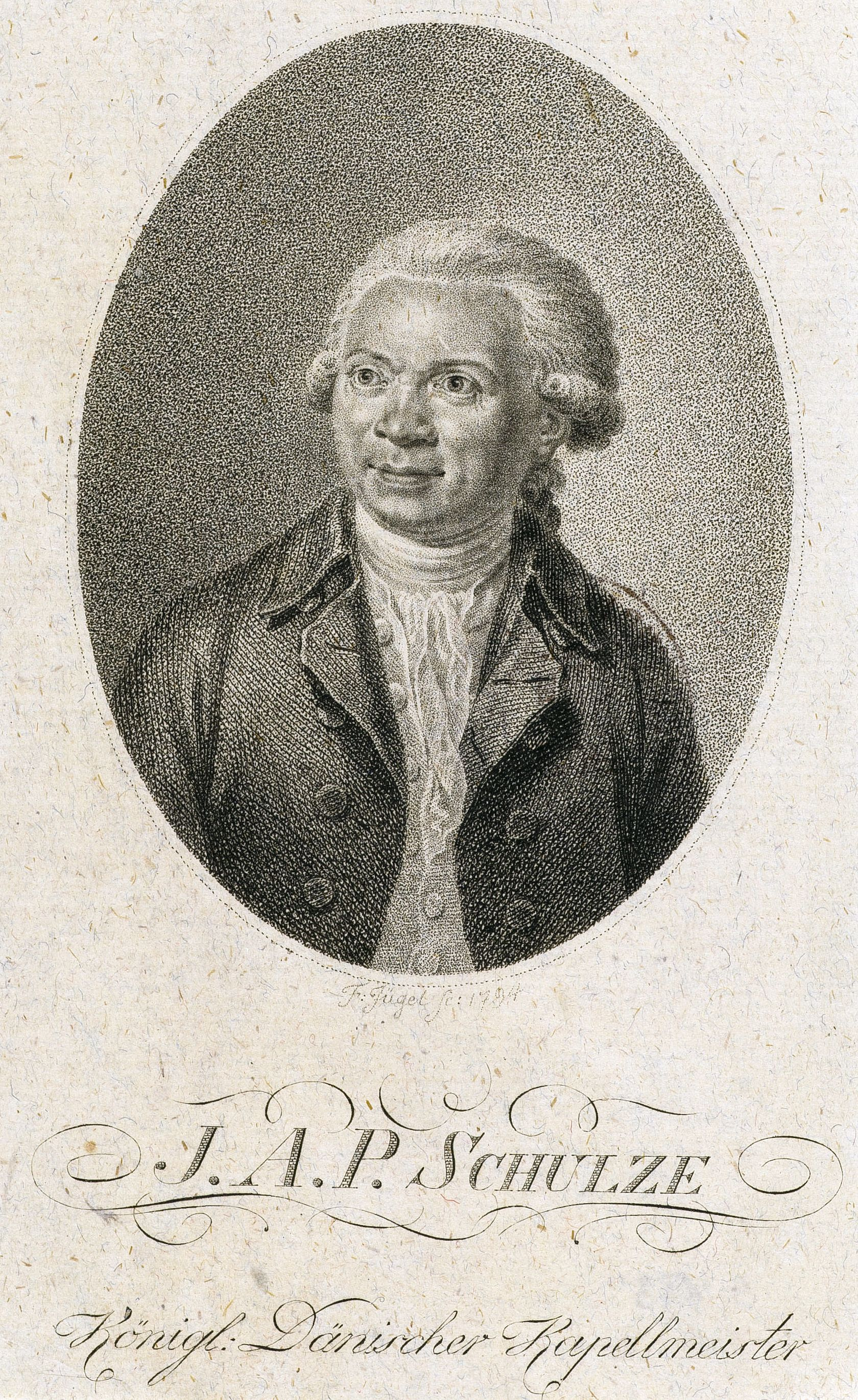 J.A.P. Schulz